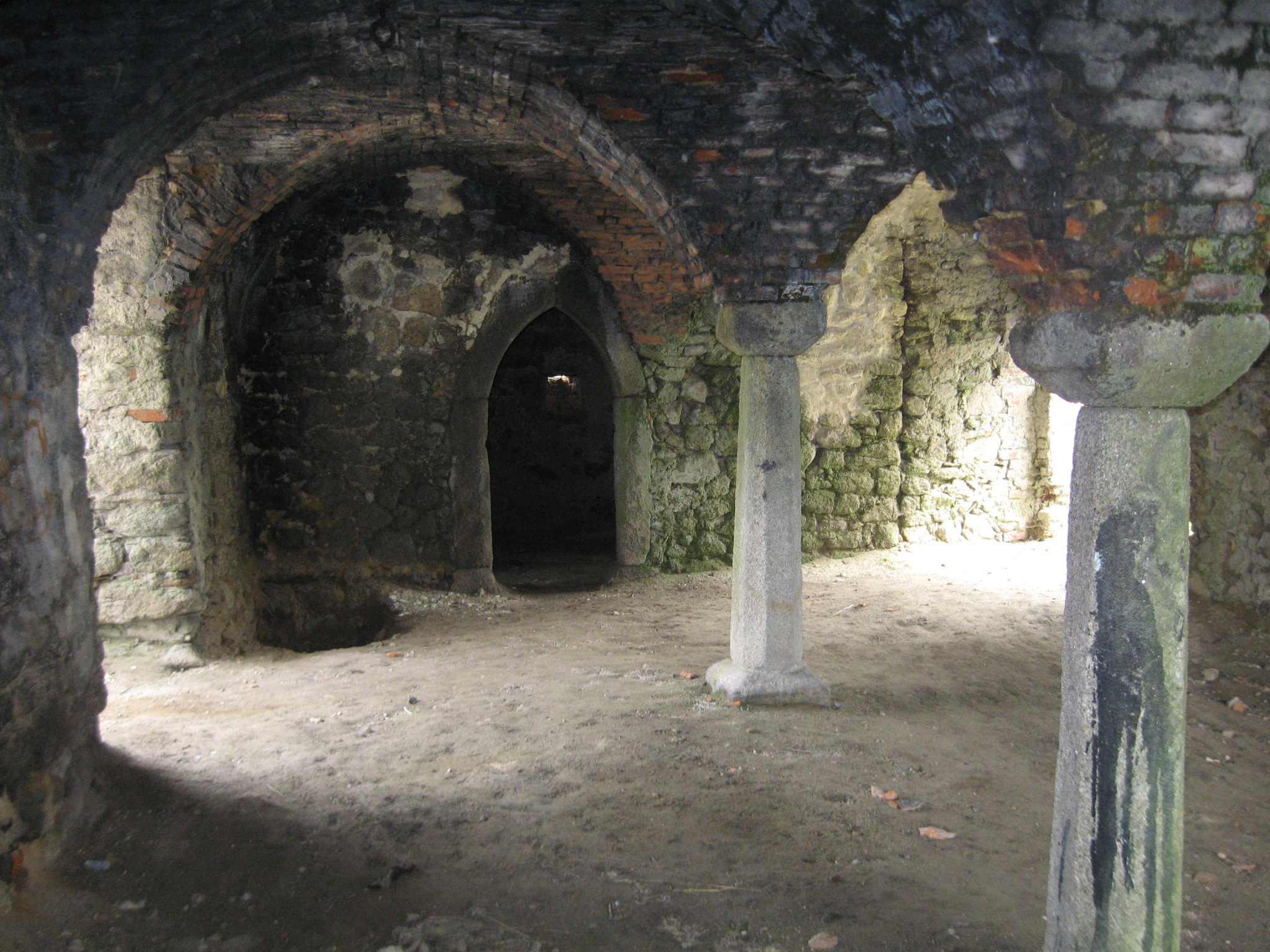 Starý Rybník: renesanční síň severního paláce